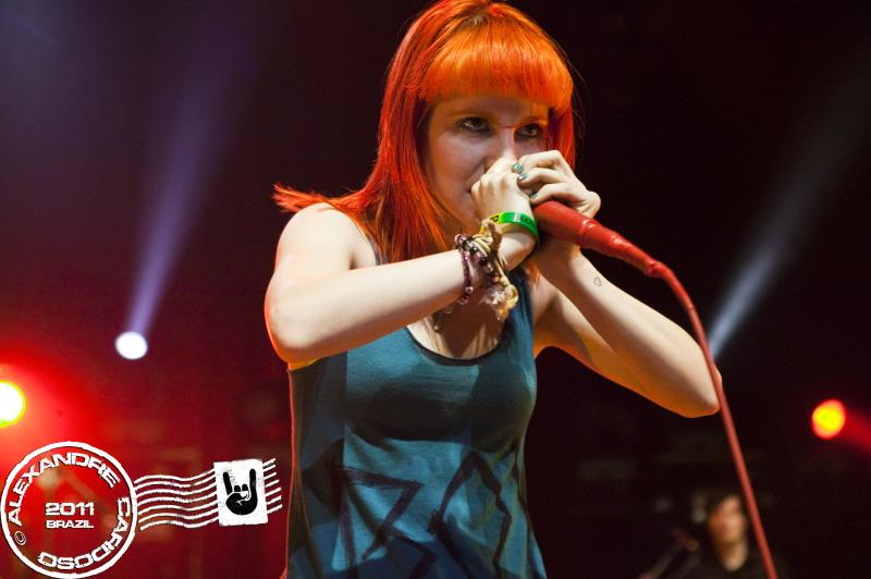 Paramore ao vivo no Credicard Hall - 20 de fevereiro de 2011 - São Paulo, SP, Brasil.